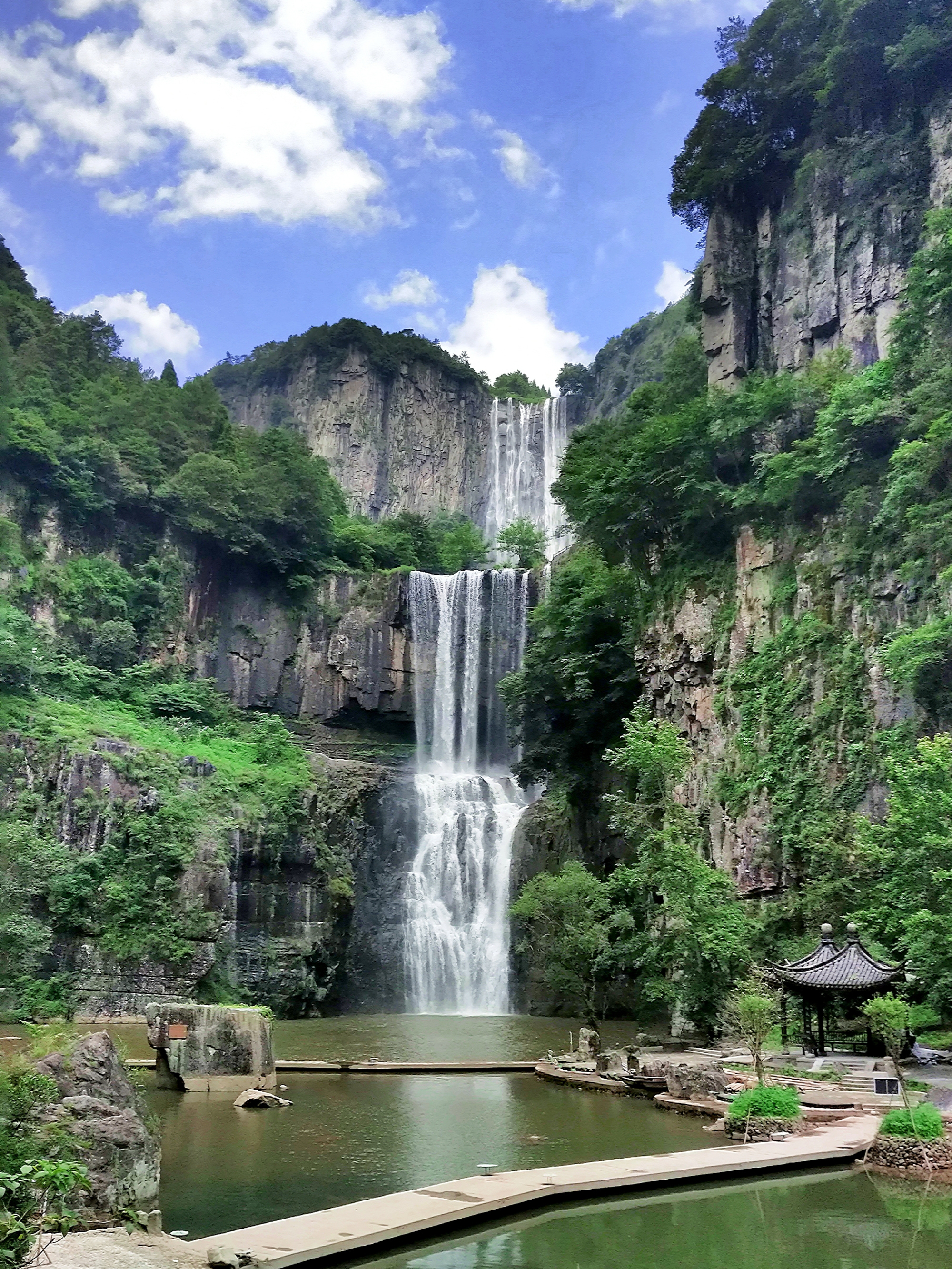 浙江省温州市文成县百丈漈